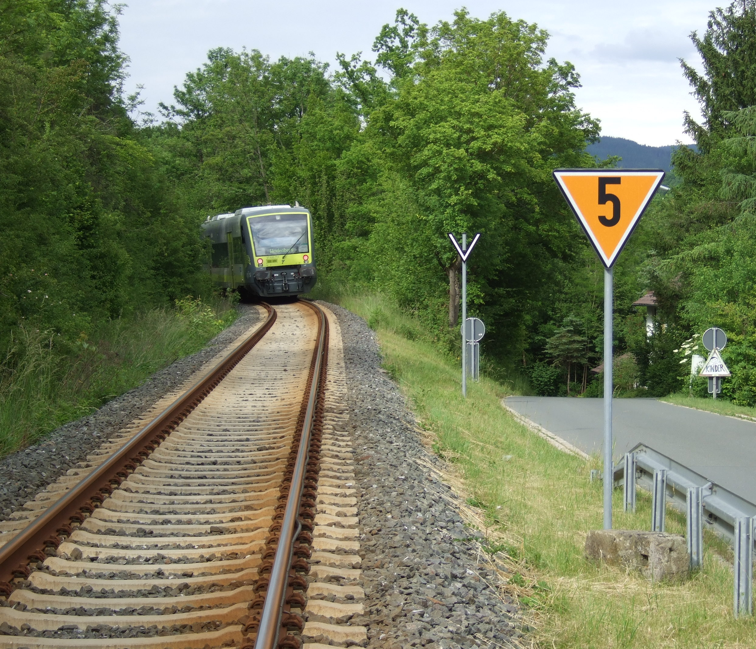 Regionalbahn nach Weidenberg bei Döhlau